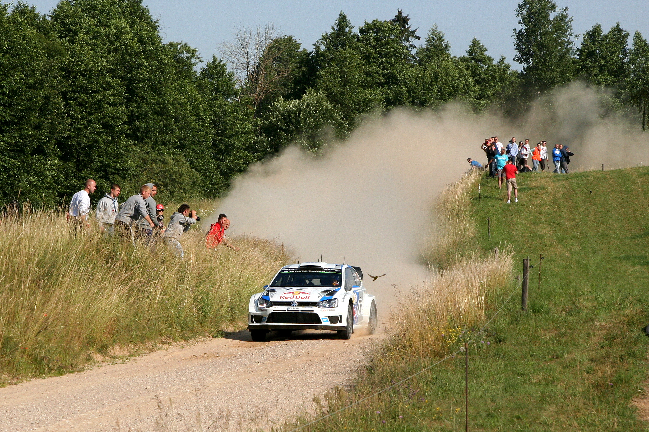 Sébastien Ogier podczas Rajdu Polski 2014, 11 OS Chmielówka 1